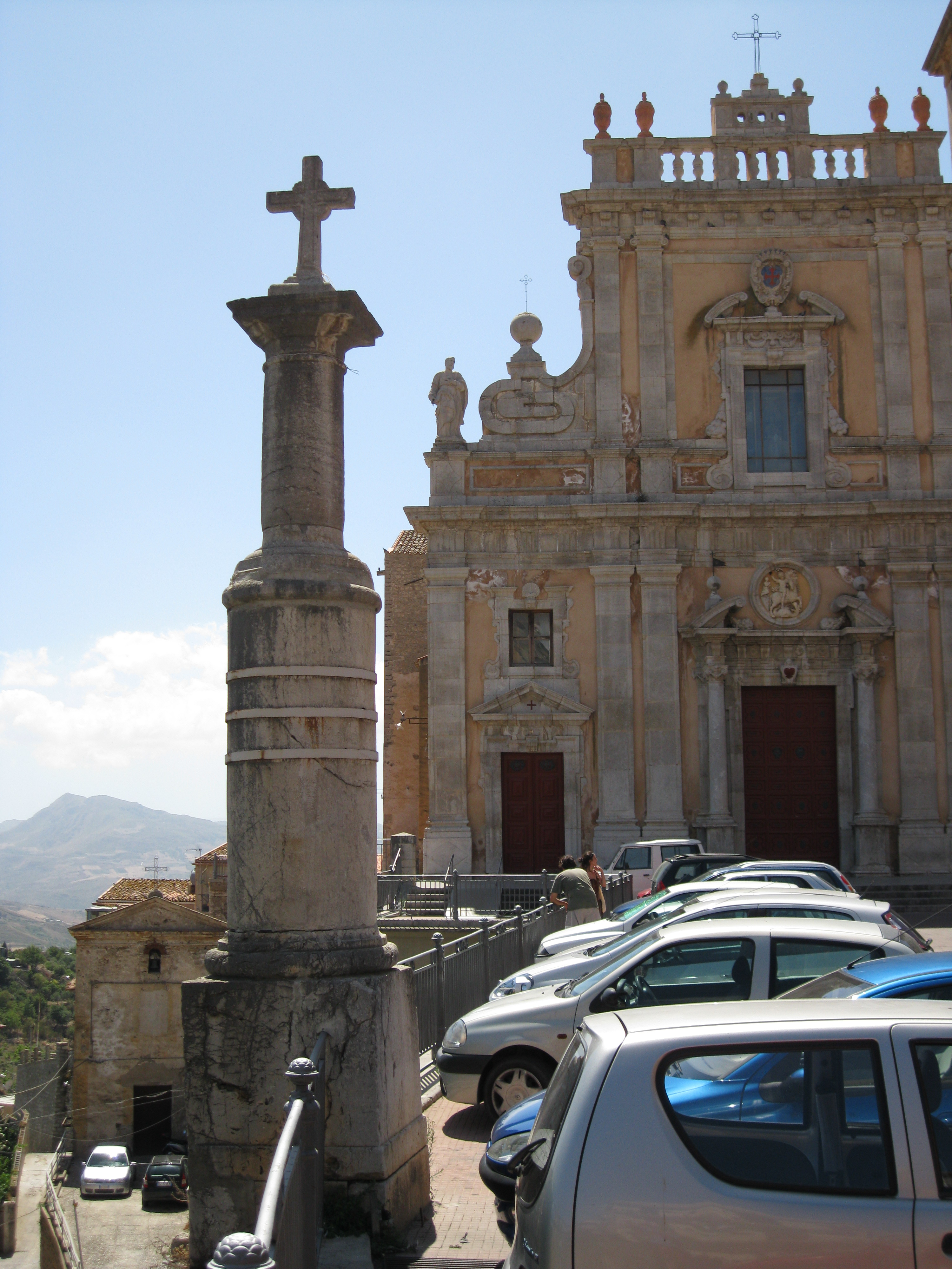 Il duomo di San Giorgio Martire a Caccamo, nella città metropolitana di Palermo.